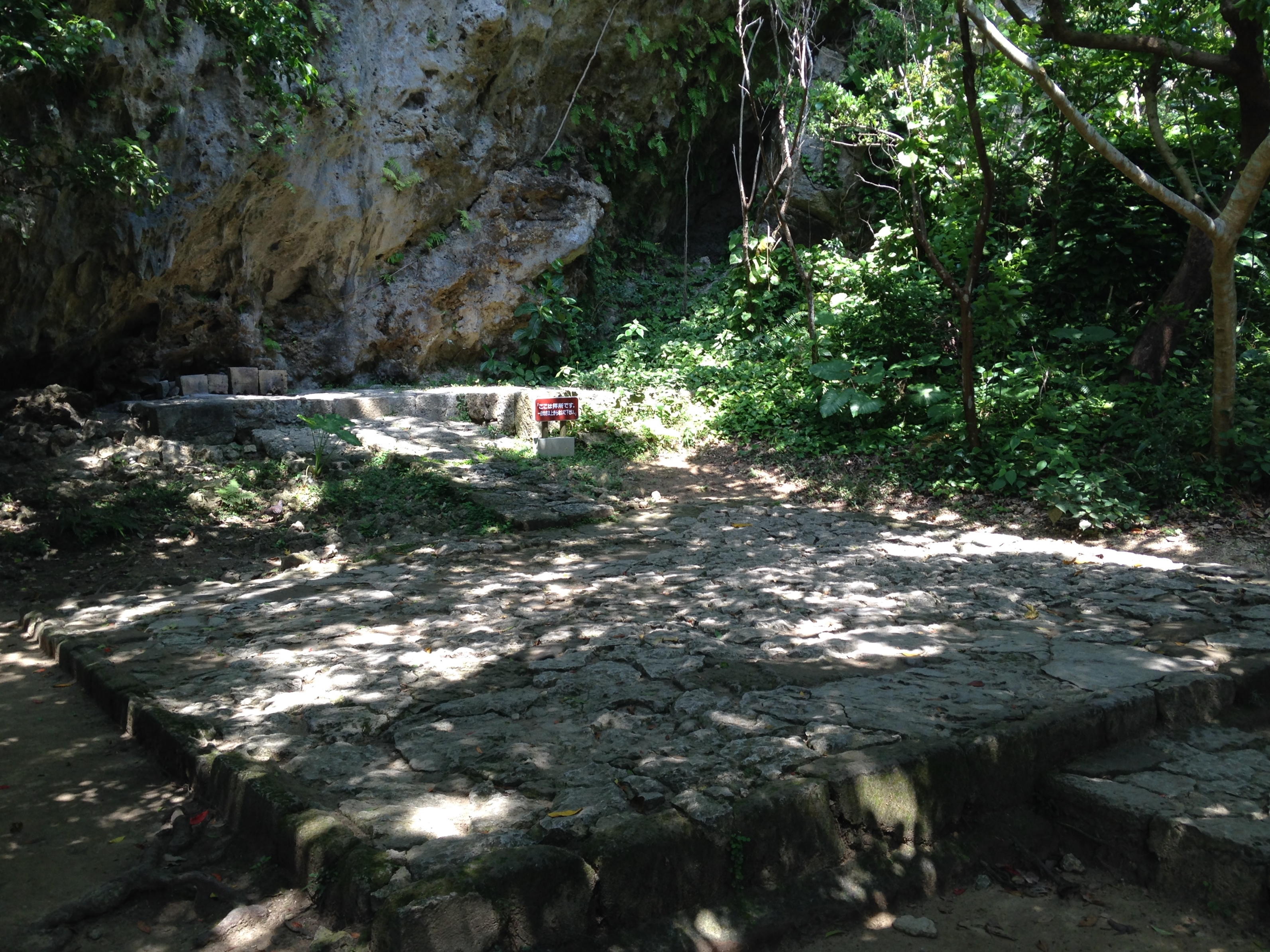 斎場御嶽の大庫理